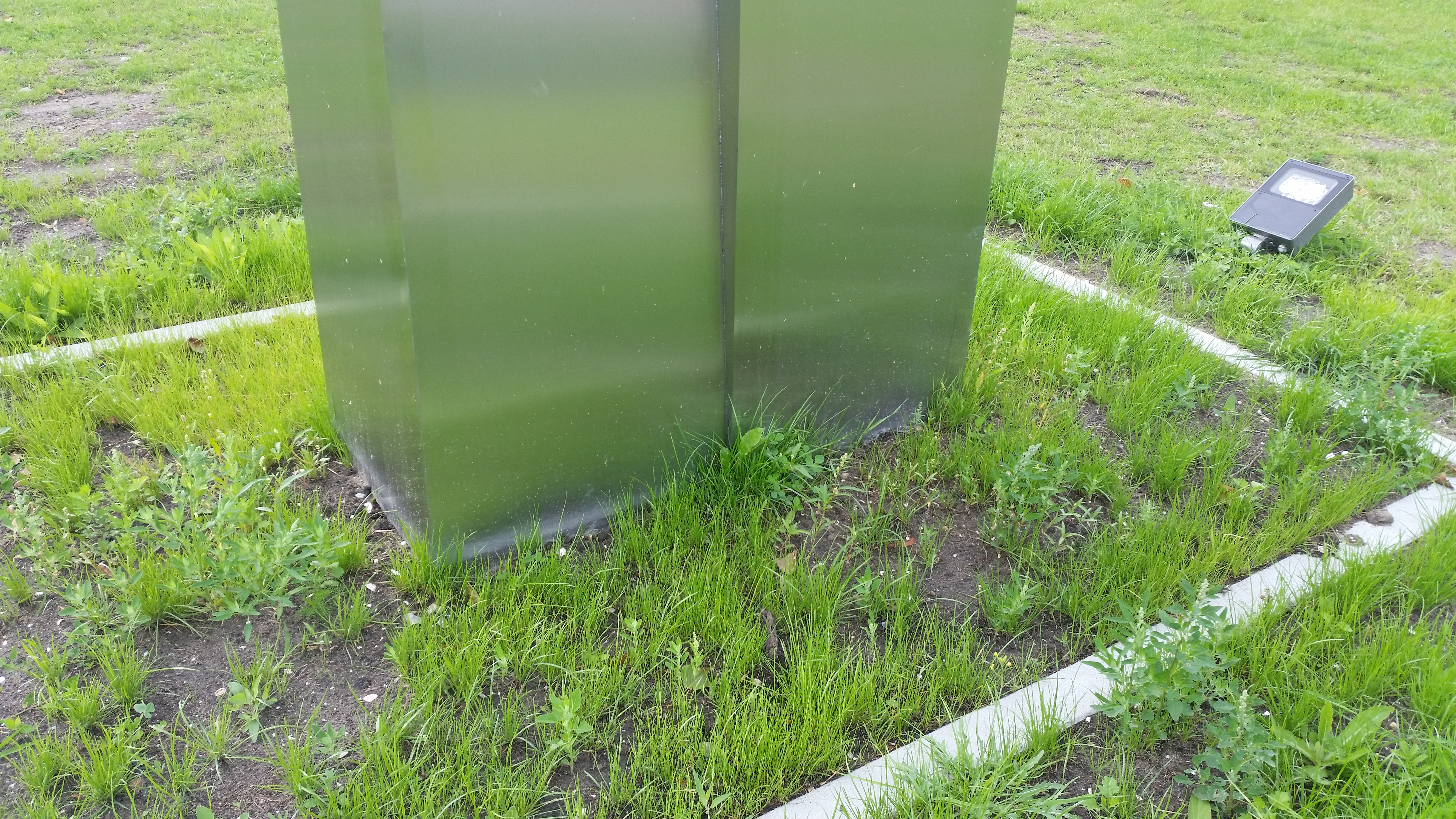 Detail van Spiegel van de hemel